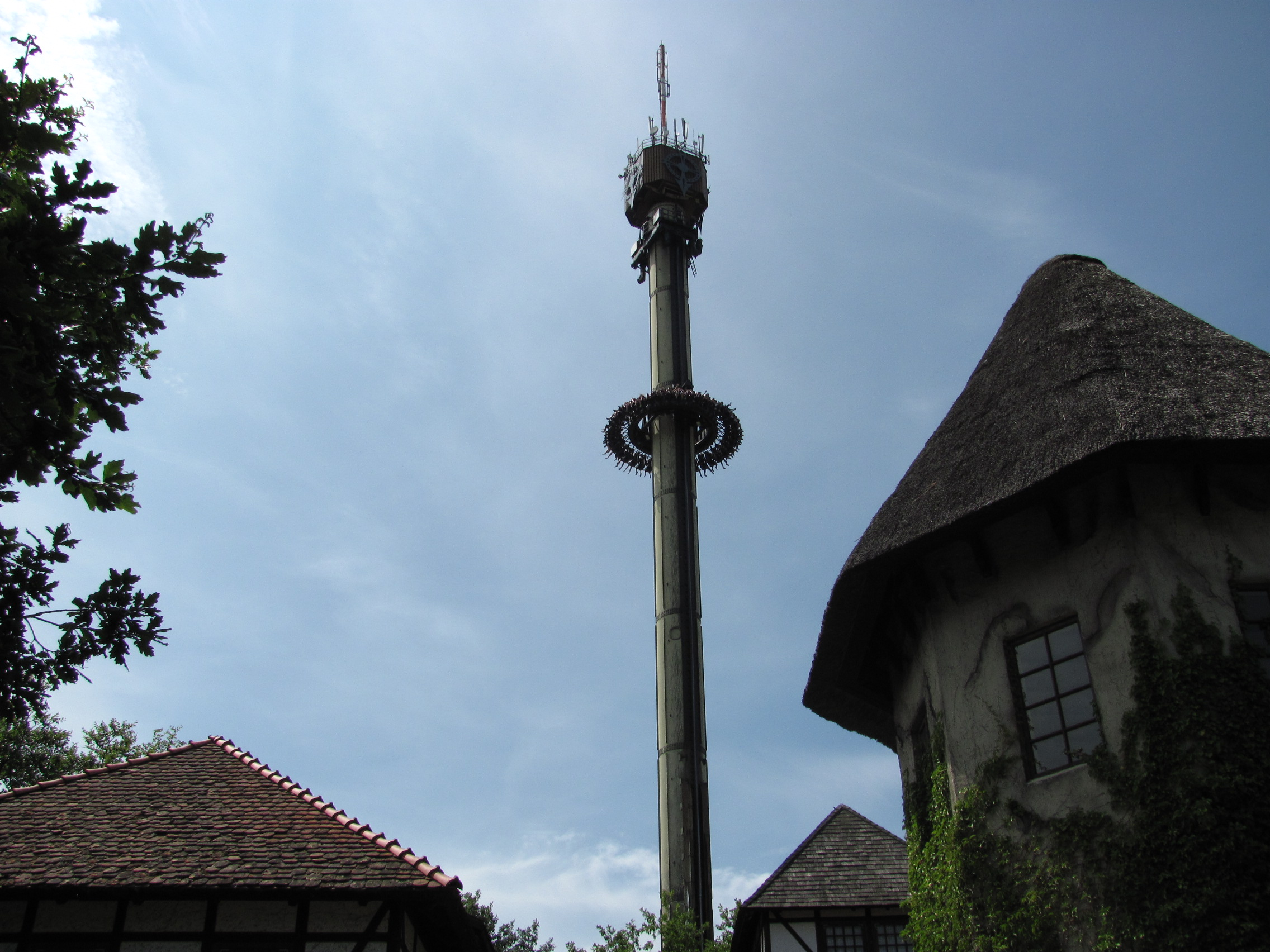 Free Fall Tower Scream